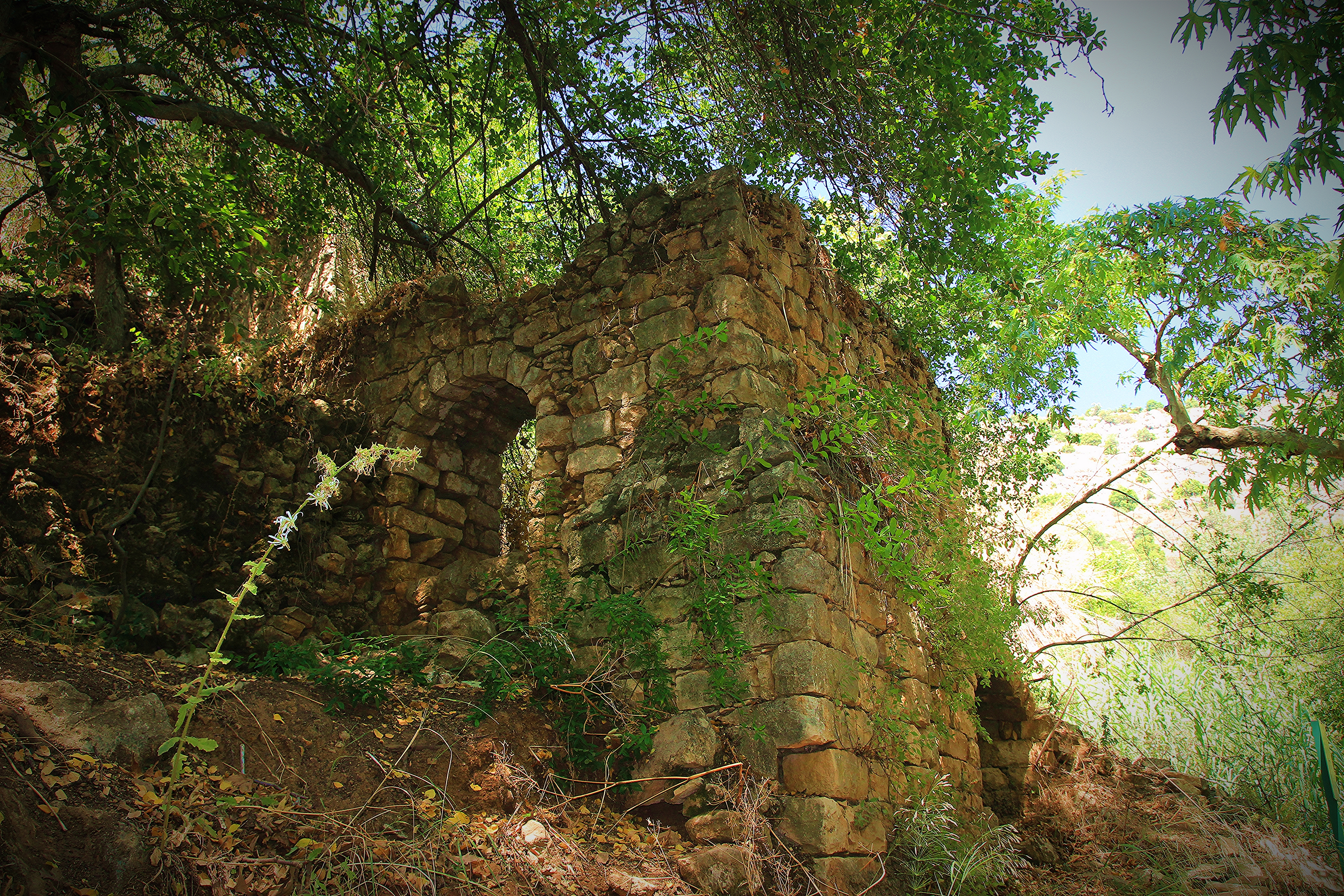 מתחם התחנות של נחל עמוד מתאפיין בצפיפות מתקנים שאינה מוכרת באזורנו. במתחם התגלו שרידי טרסות, טחנות קמח, תעלות מים, סכר הטיה וגשרים להם ערך היסטורי בהיותן עדות לאורחות החיים ולמלאכות המסורתיות בגליל בתקופות האמורות. טחנות הקמח בחלקו העליון של נחל עמוד הוקמו בתקופה הצלבנית ומרבית השרידים הנראים כיום הם מהתקופה העות'מאנית. טור הטחנות משמר תוואי של מתקנים קודמים, ככל הנראה מבטשות צמר, שהגיע לשיא פעילותו במאה ה-16, תקופת תור הזהב של צפת. מקצת הטחנות פעלו עד שנות ה-50 למאה ה-20.